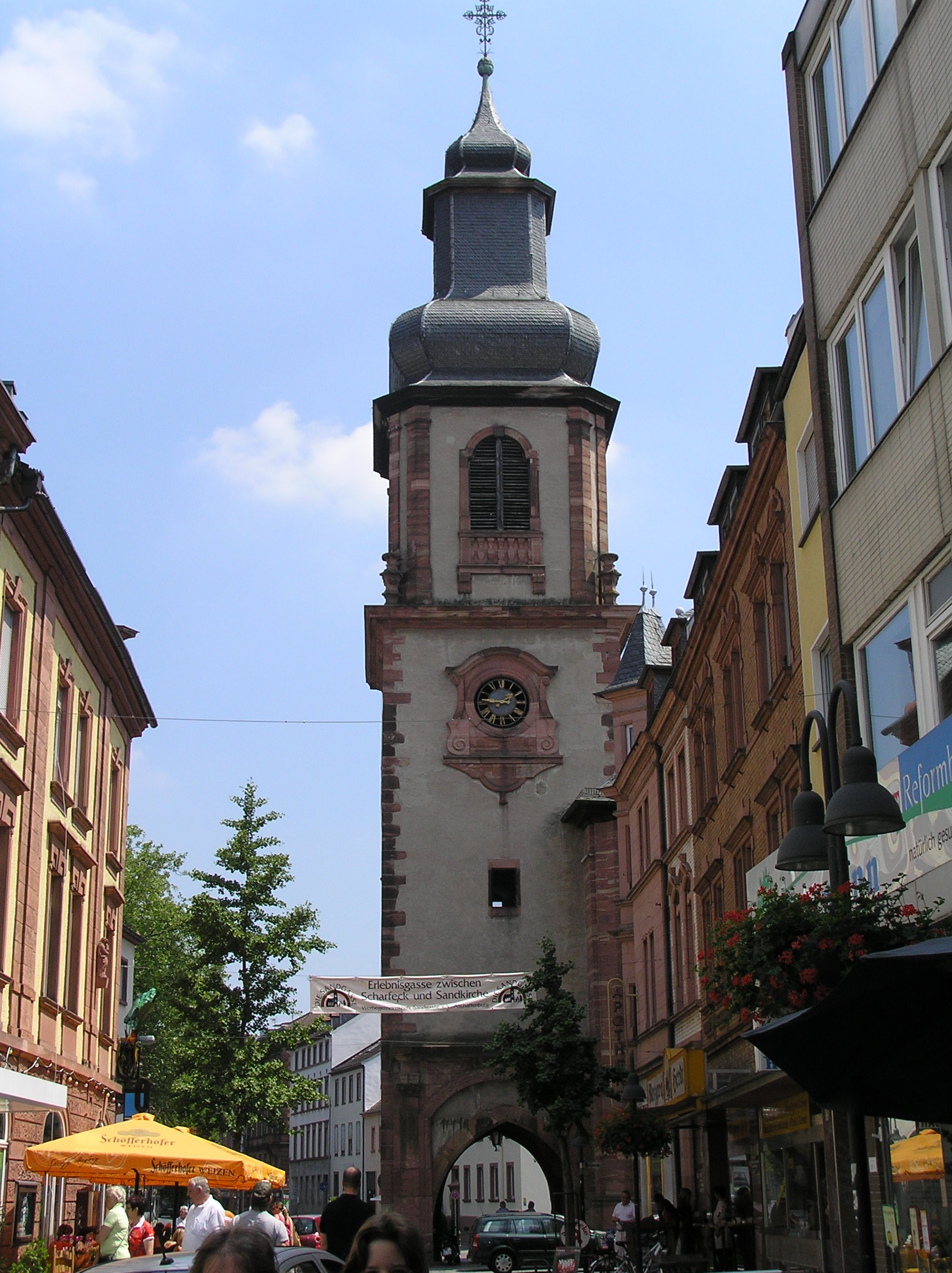 Turm der Sandkirche in der Betgasse 1 in Aschaffenburg von der Sandgasse aus gesehen